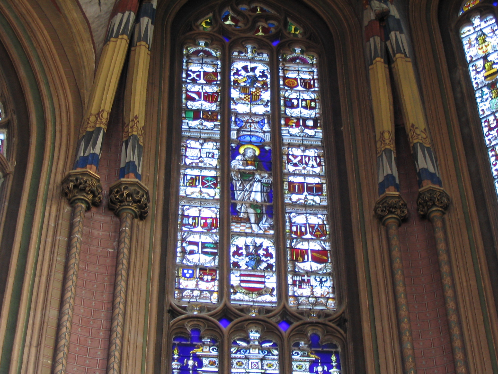 Vitrail des Trente-deux métiers de Liège dans